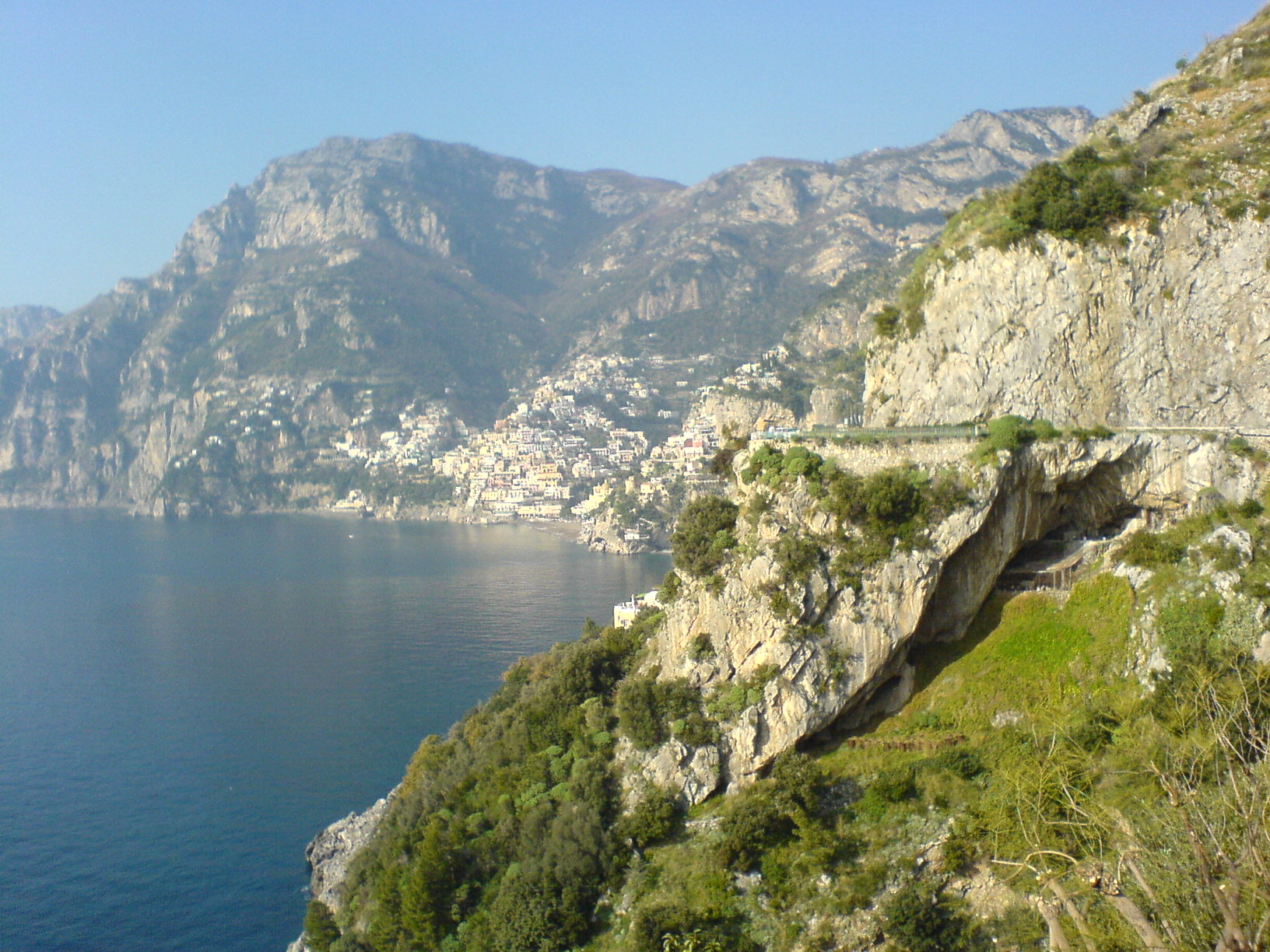 Amalfi Coast